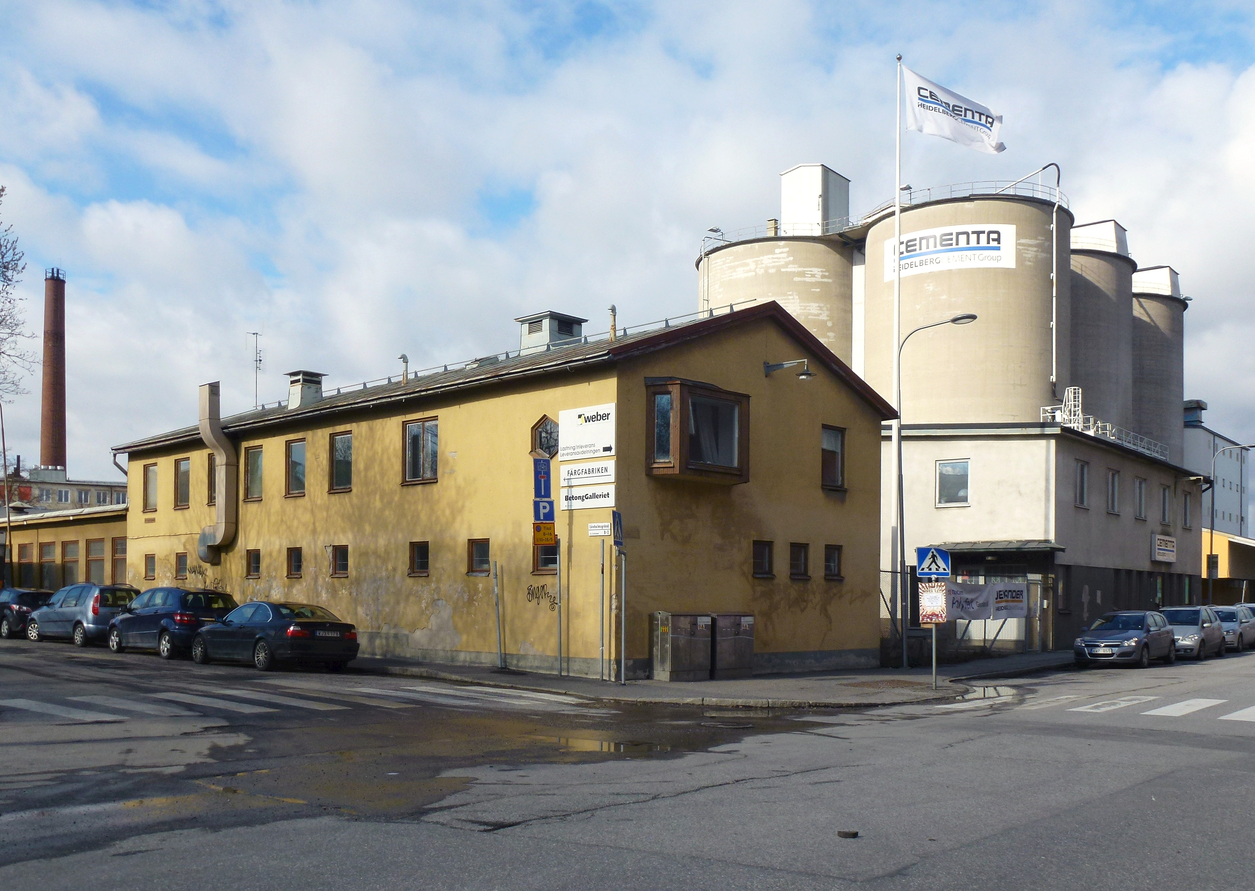 Cementas anläggning på Lövholmen